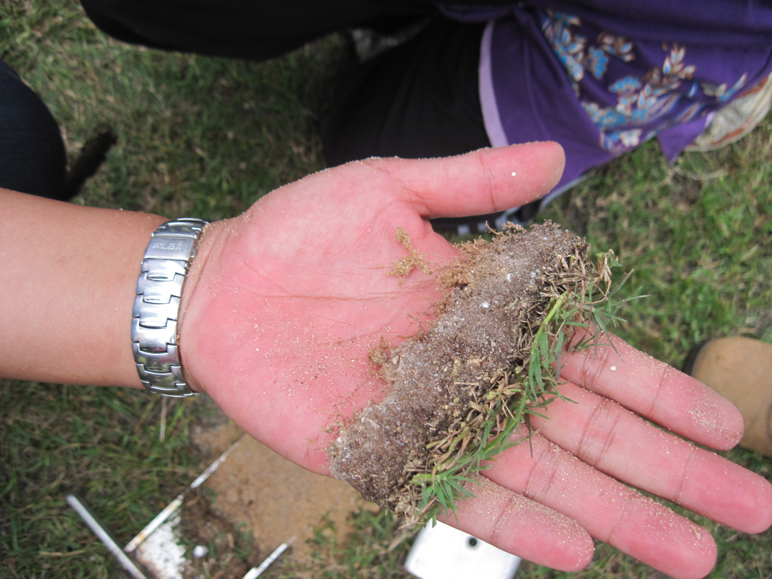 Lapisan nipis jejerami (thatch) rumput turf di UPM.